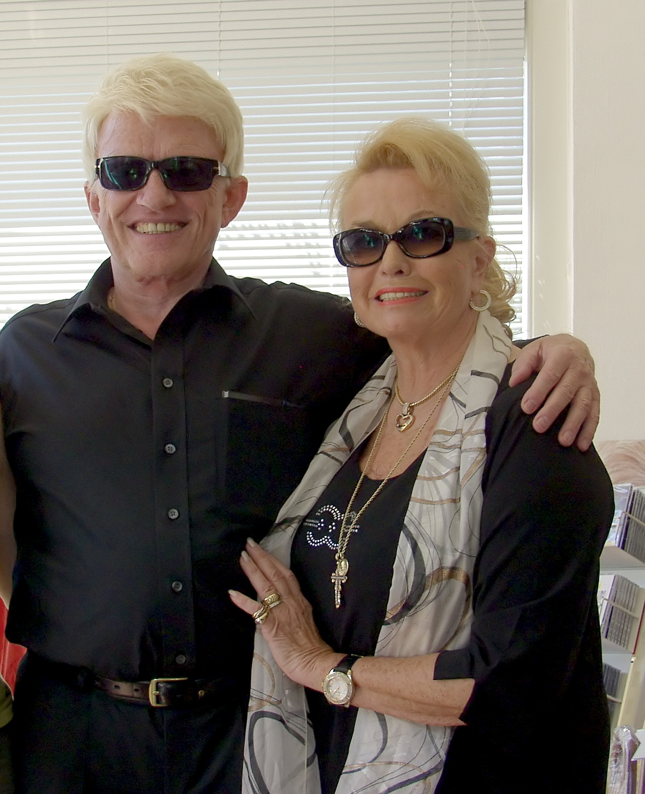 Heino und Hannelore Kramm in ihrem Heino-Fanshop in Bad Münstereifel